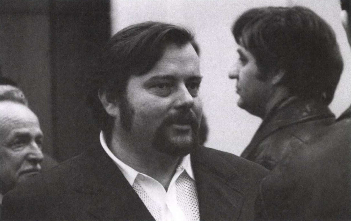 Pálfy Gusztáv (Kiskunfélegyháza, 1942. március 28. –) Katona József- és Príma díjas magyar szobrászművész.